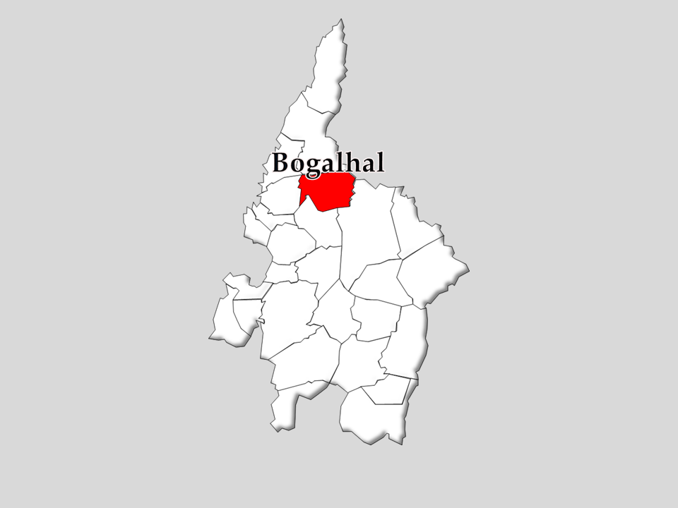 Censos 1864/2011